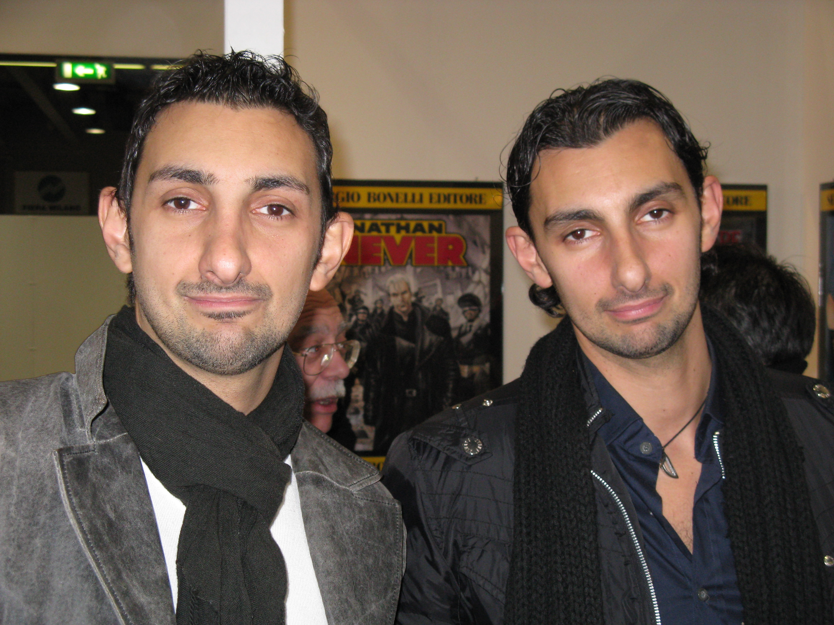 Raul e Gianluca Cestaro a Cartoomics 2011